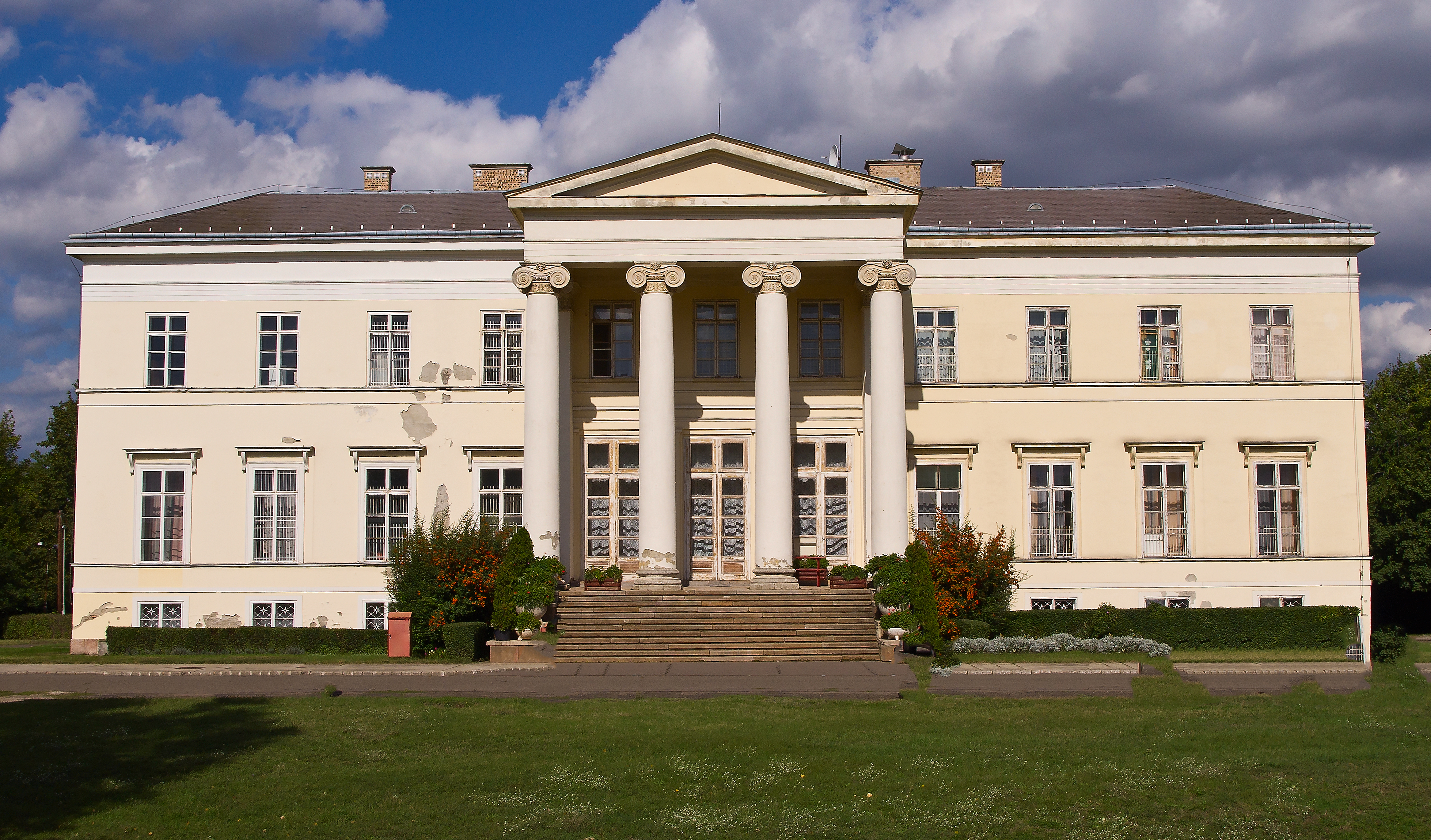 Teleki-kastély This is a photo of a monument in Hungary. Identifier: 7072